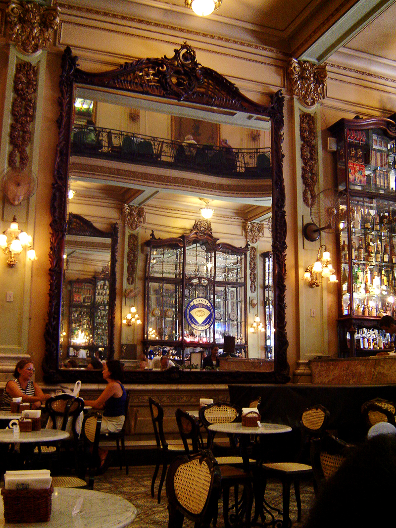 Interior of Confeitaria Colombo in Rio de Janeiro, Brazil